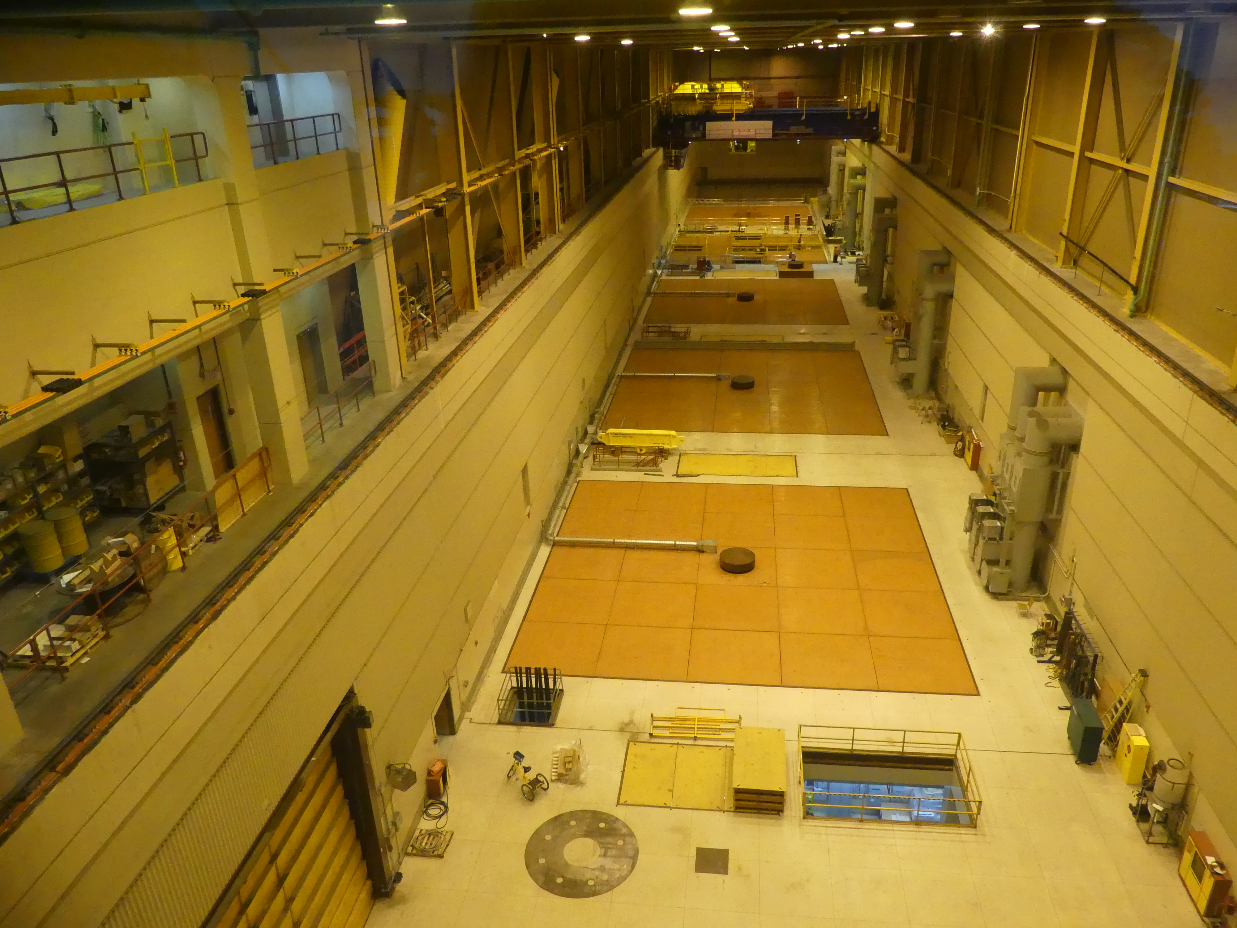 Salle des machines de la centrale, la quatrième turbine est à l'arrêt pour maintenance.